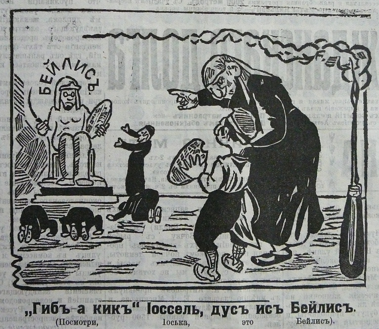 Карикатура на «Дело Бейлиса» из газеты «Казанский Телеграф»